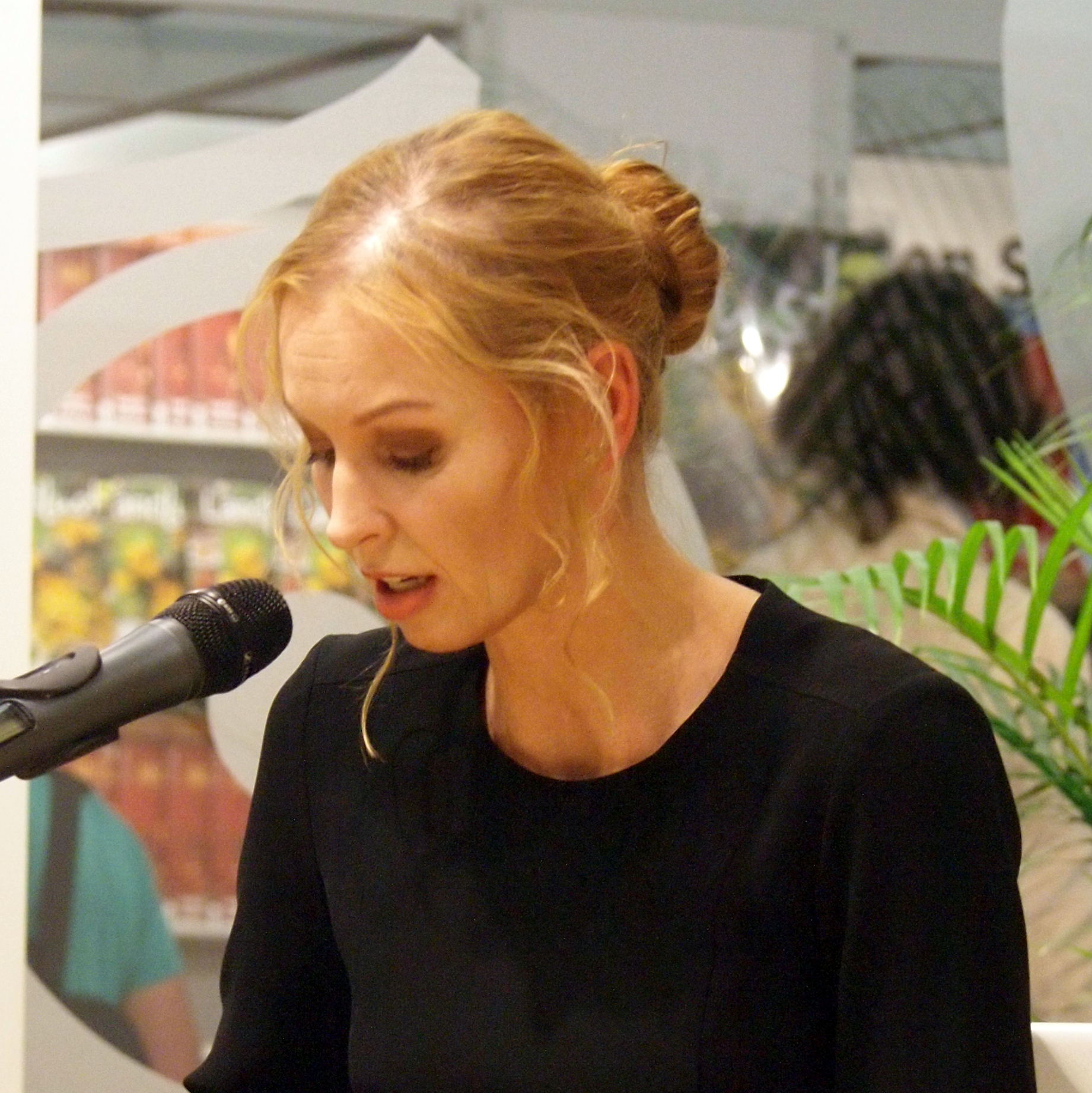 Autorin Cassandra Negra (eigentl: Dr. Sandra Maxeiner) auf der Frankfurter Buchmesse 2014